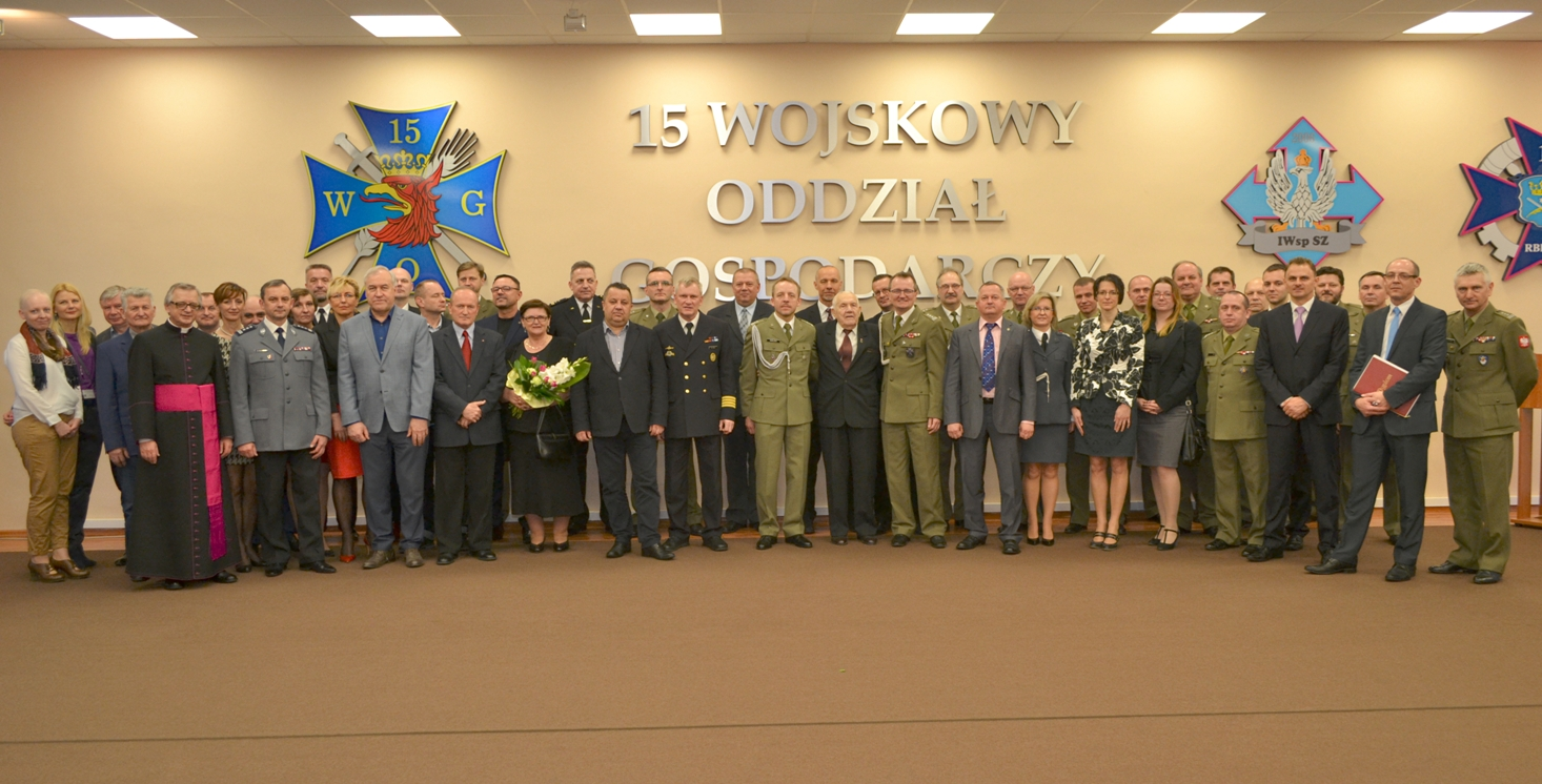 Szczecin, 08.04.2016r. Uroczystość zdania i objęcia obowiązków komendanta 109 Szpitala Wojskowego